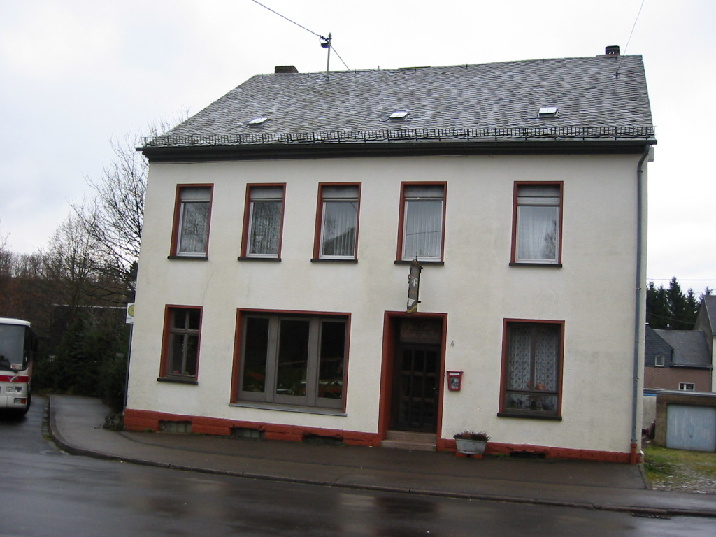 Standort des Hermeskeiler Feuerwehrmuseums von 1995 bis 2006